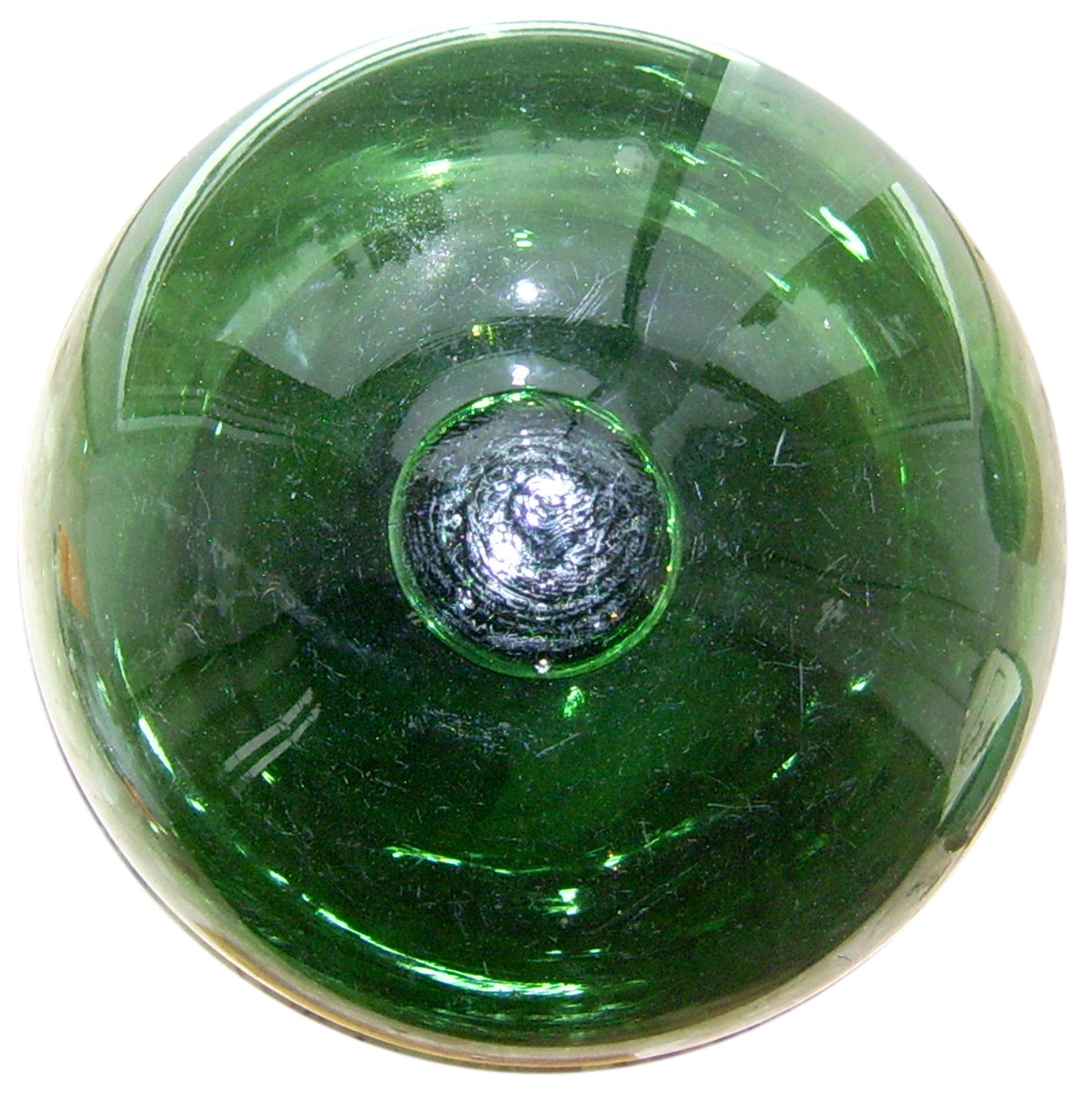 Hohle Glaskugel als Schwimmkörper für ein Fischernetz im "Zwei Siele Museum" in Dornumersiel